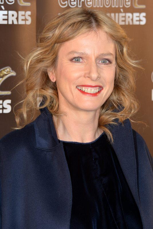 Karin Viard à la cérémonie des prix Lumières